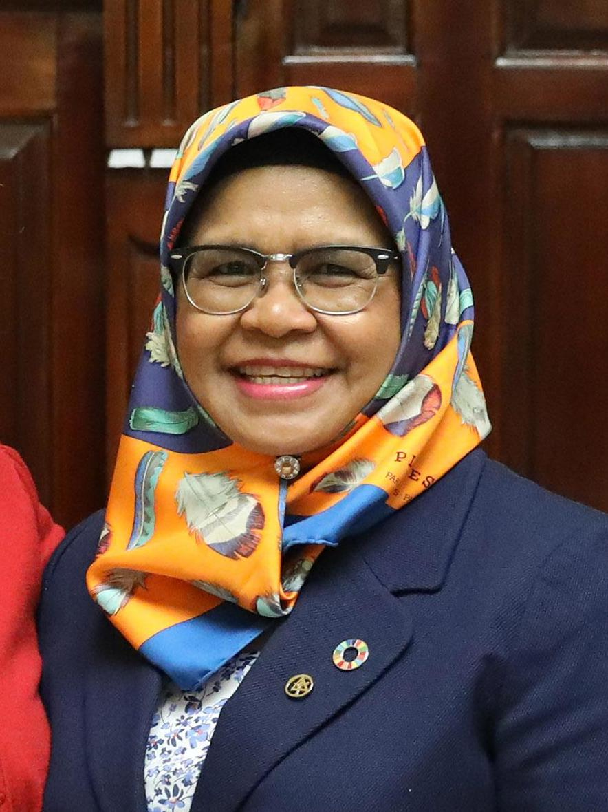 La alcaldesa de Madrid, Manuela Carmena, se ha reunido hoy, viernes 8 de junio, con la directora ejecutiva de ONU-Habitat, Maimunah Mohd Sharif, en el palacio de Cibeles, donde han tratado, entre otros asuntos, el proceso de implementación de la Nueva Agenda Urbana y los Objetivos de Desarrollo Sostenible de Naciones Unidas. En el encuentro han estado también José Manuel Calvo, delegado de Desarrollo Urbano Sostenible, y Antonio Zurita, director general de Acción Internacional y Ciudadanía Global, del Ayuntamiento de Madrid.